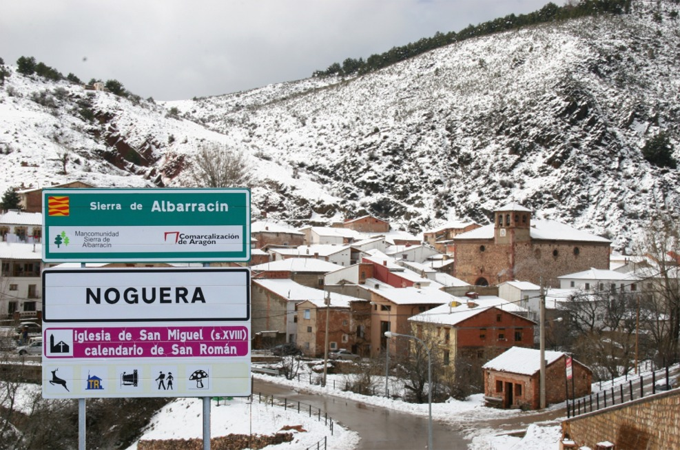 Noguera v zimě, Španělsko